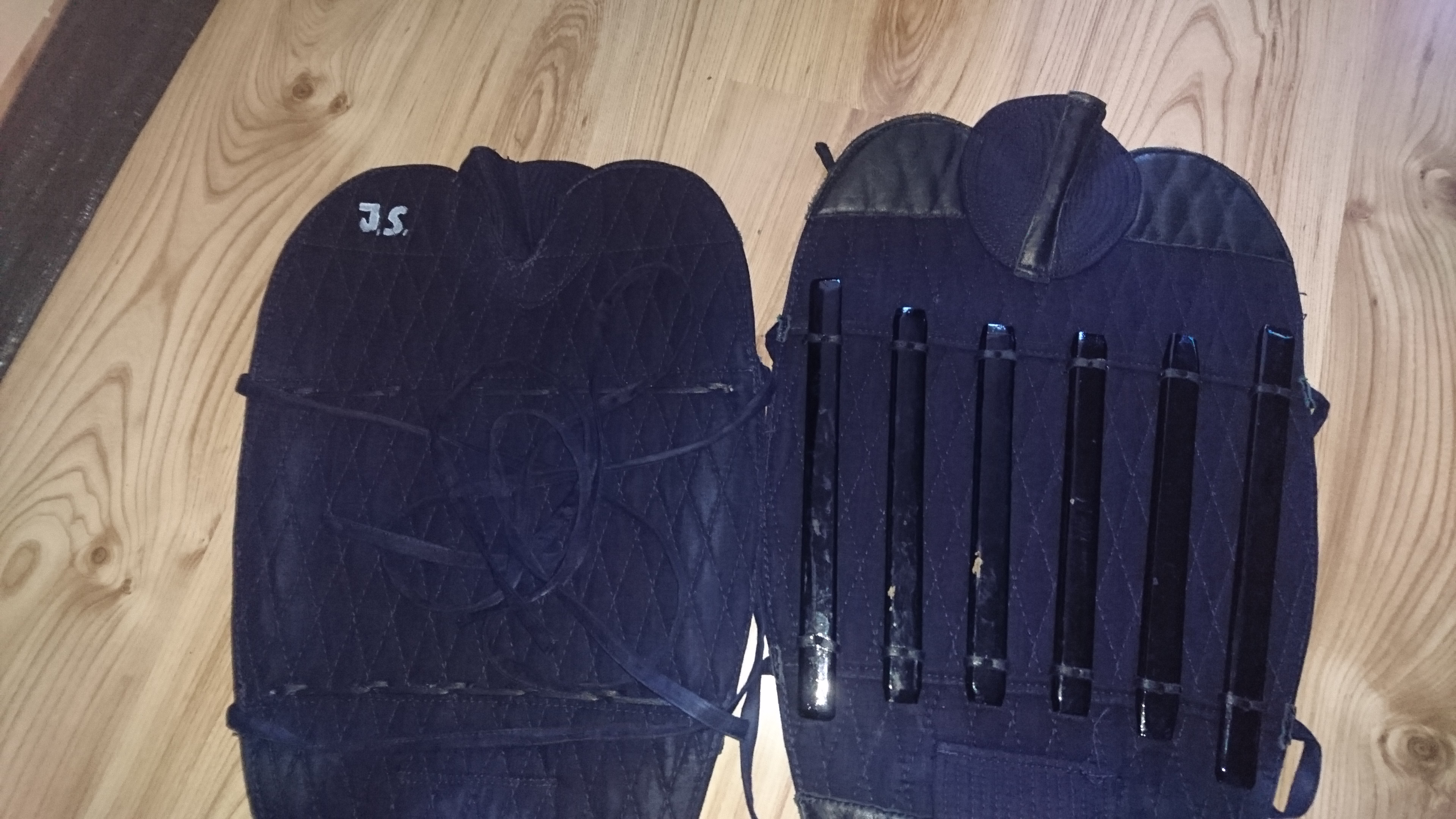 Voder- und Rückseite einer Sune Ate für Naginata